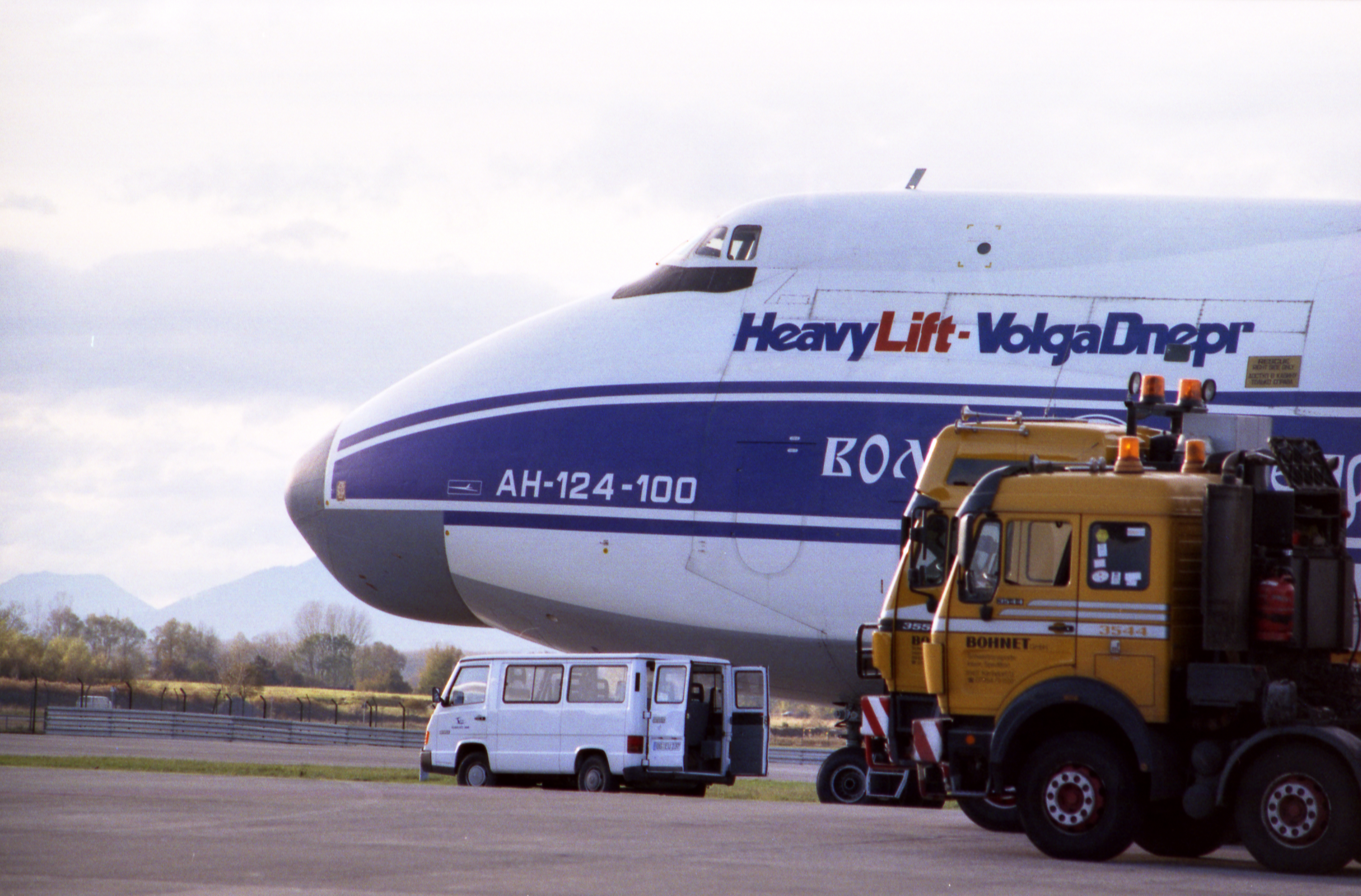 Antonov 124 am 7. November 1997 beim Verladen einer Tunnelvortriebsmaschine in Lahr (EDTL)